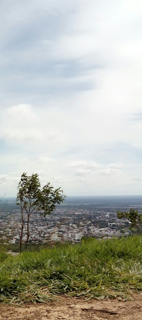 mirador cerro buena vista.